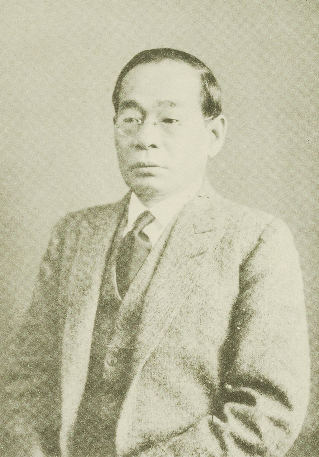 Portrait of Kagami Kenkichi (各務鎌吉, 1869 – 1939)